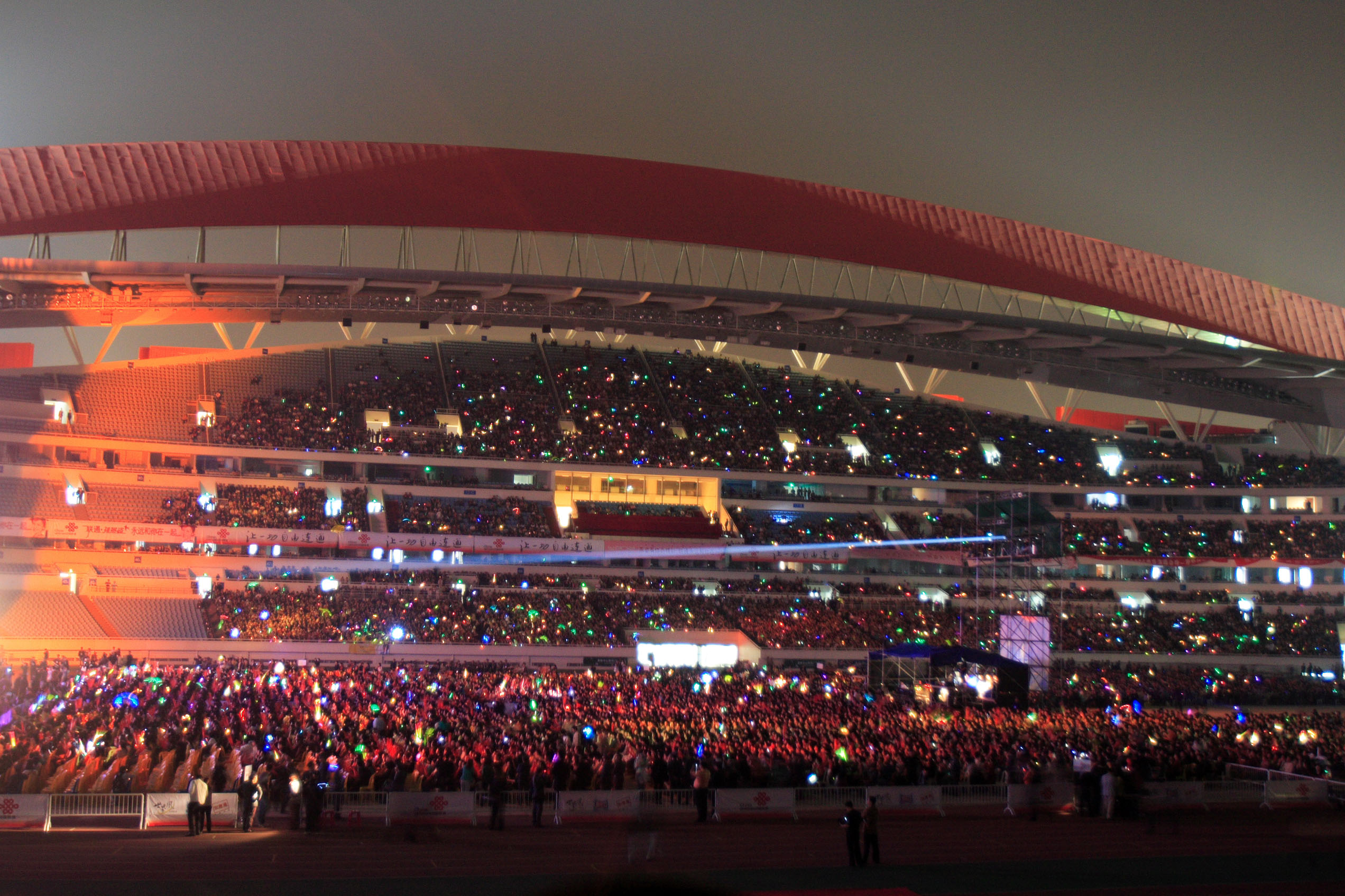 Stefanie Sun; 孙燕姿 at Nanjing